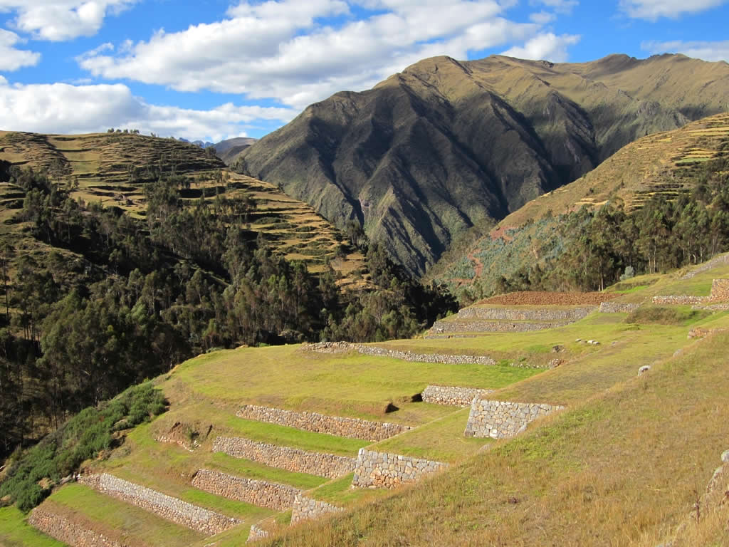 Inca terraces, Chincero, Peru.